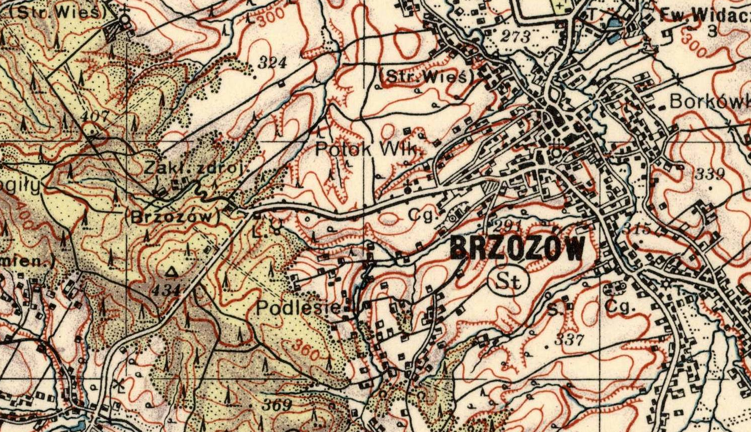 Okolice Brzozowa. Fragment Mapy Taktycznej Polski 1:100 000, ark. Sanok (pas 50, słup 34) z 1937 r.